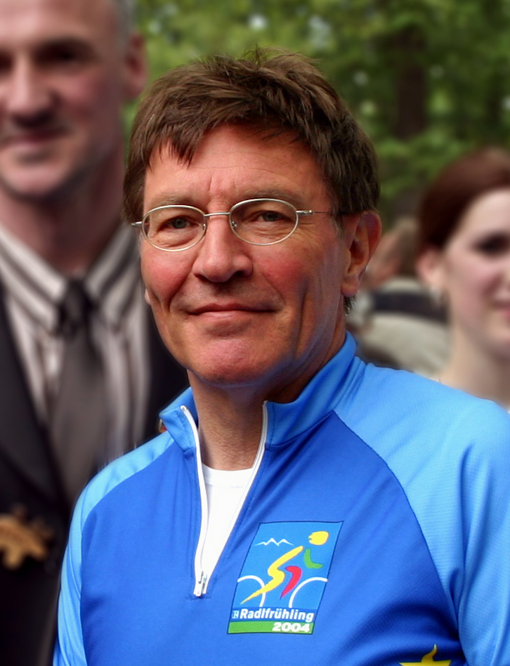 Staatsminister Eberhard Sinner bei einer Wahlkampfveranstaltung mit Dr. Anja Weisgerber im Schweinfurter Tiergarten